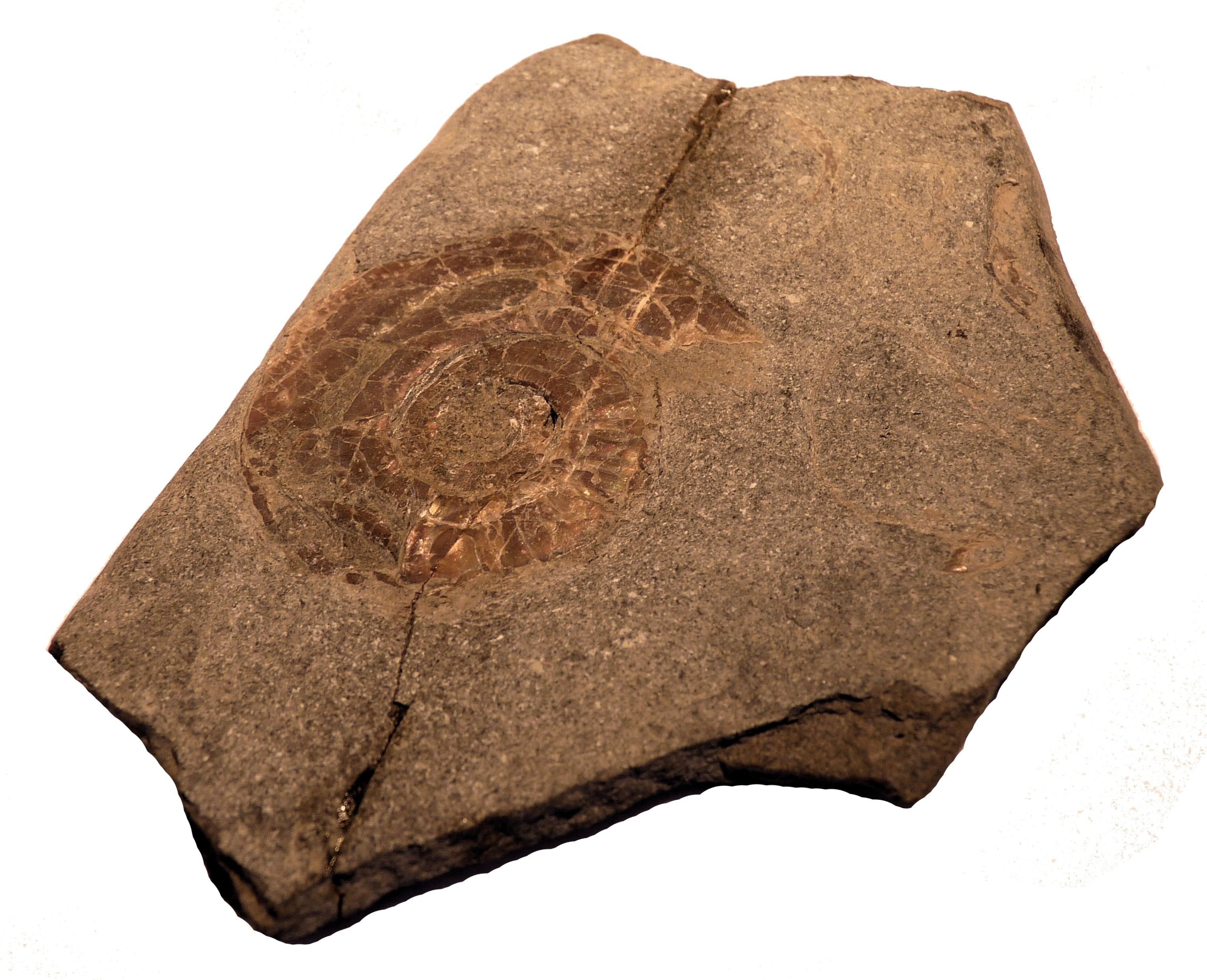 Psiloceras Planorbis. Étage : Hettangien. Provenance : Watchet, UK.